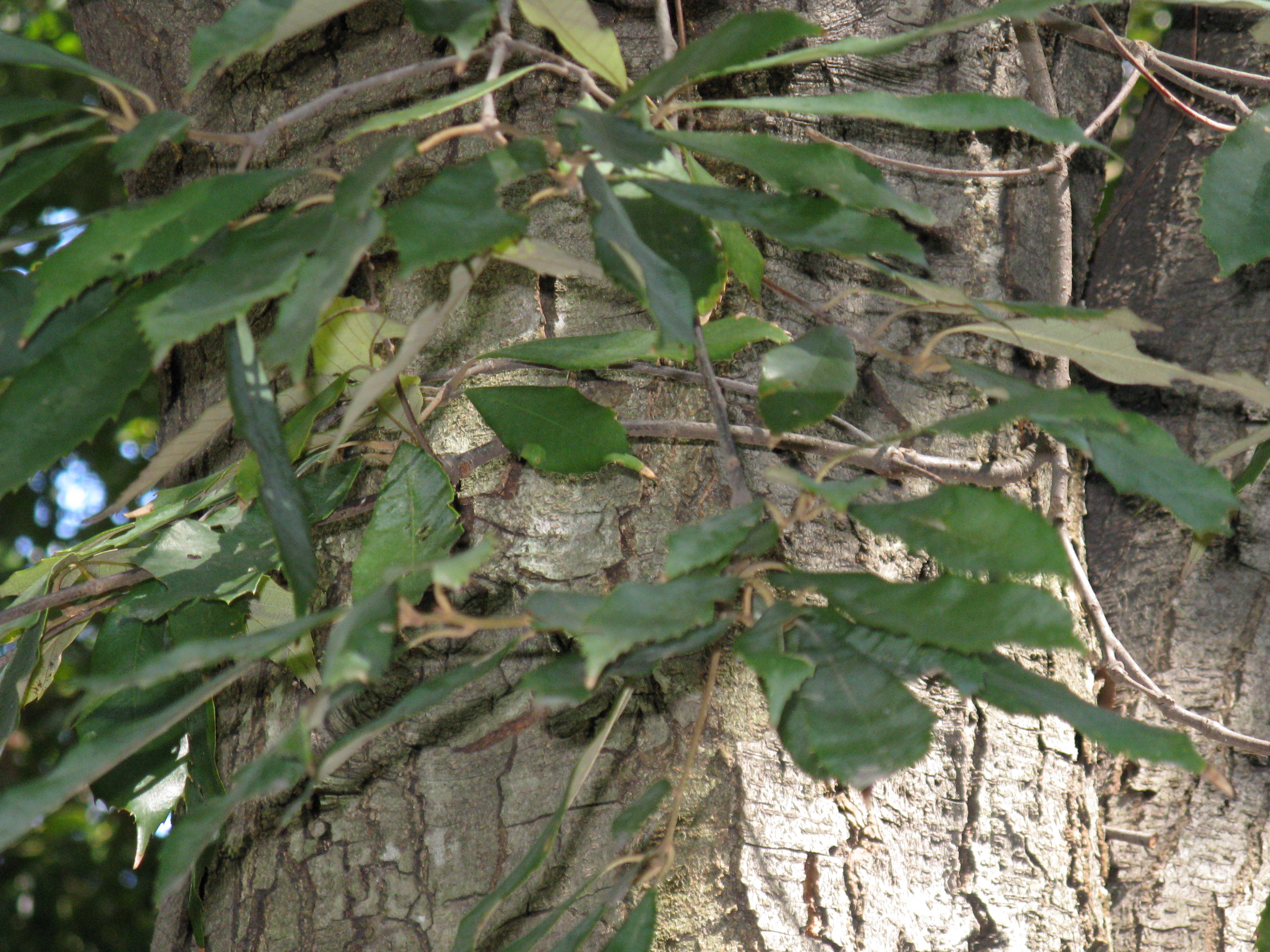 Scientific name Quercus gilva